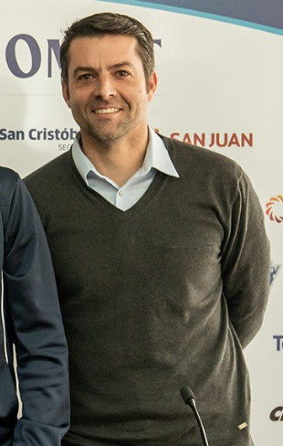 El presidente de la Asociación Argentina de Tenis, Agustín Calleri; el secretario de Deportes de la Nación, Javier Mac Allister y los capitanes del equipo de Copa Davis, Gastón Gaudio y Guillermo Coria, brindaron una conferencia de prensa en el CeNARD donde anunciaron la nómina que enfrentará a Colombia, del 14 al 16 de septiembre en San Juan.